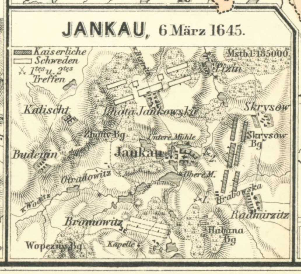 Schlachtfeld bei Jankau, 6. März 1645